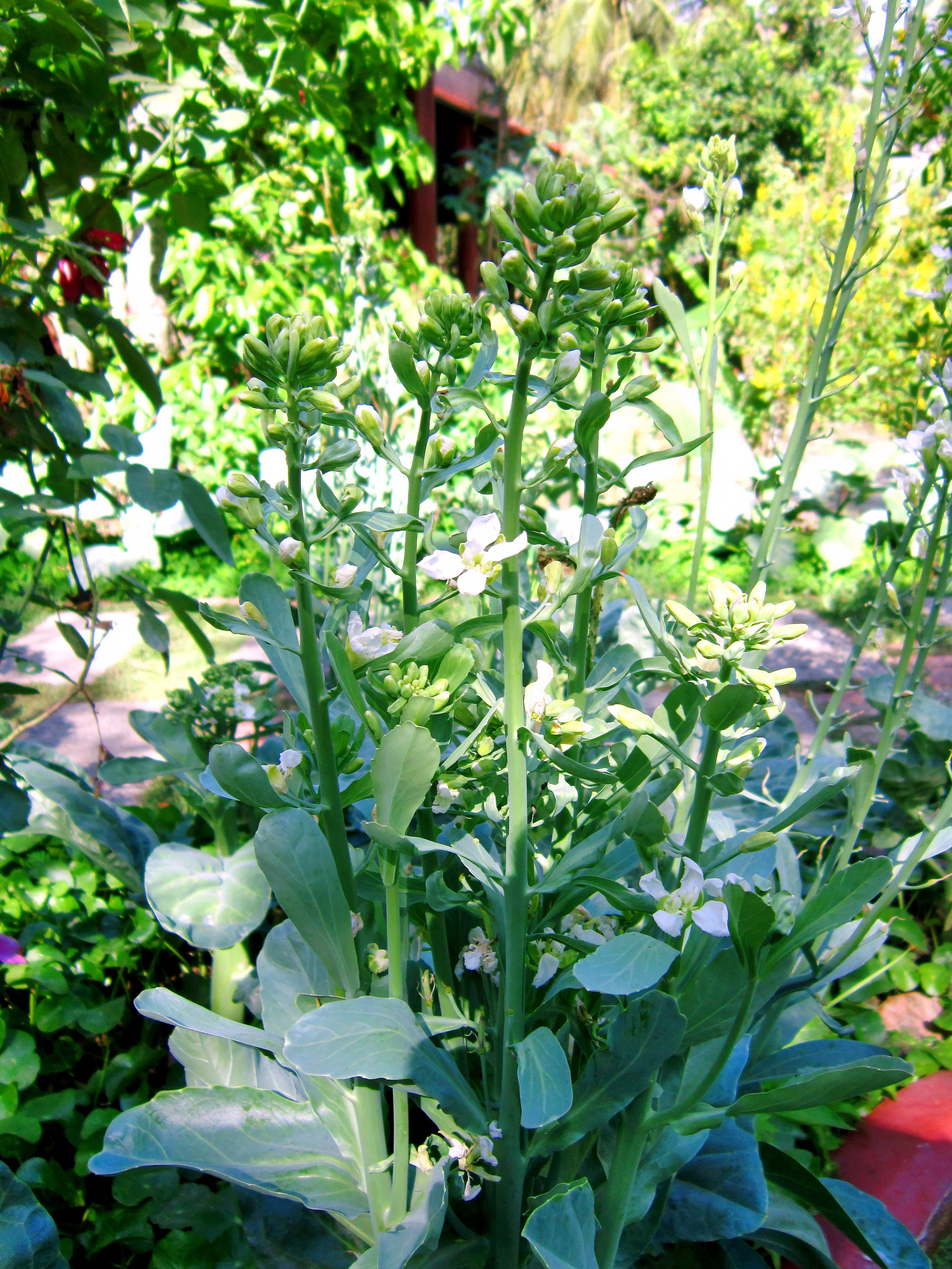 Cải rổ, tên tiếng Anh là Chinese Brocoli, còn được gọi là “kailaan” hay cải làn (theo Cantonese gọi kai-lan), hoặc còn có tên gọi cải ná thuộc họ Cải (còn gọi là họ Thập tự; Cruciferae)